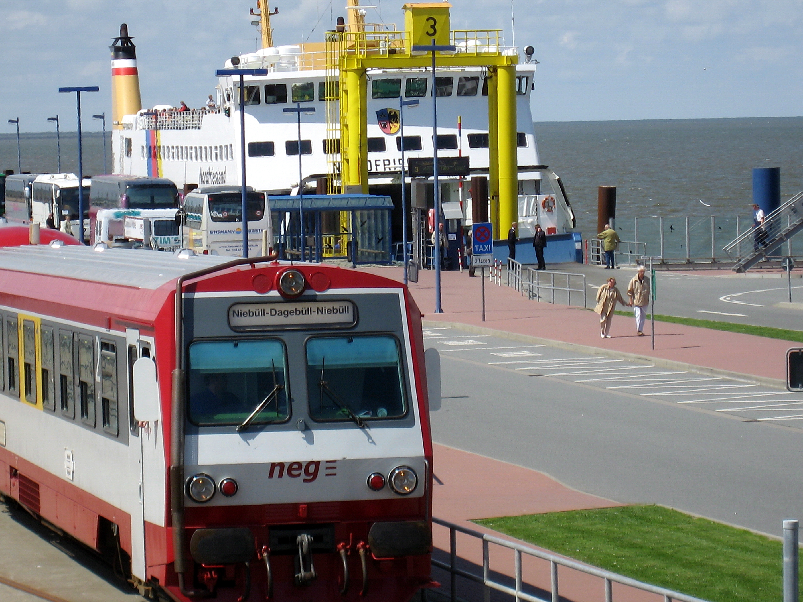 Dagebüll, Anleger der W.D.R. und Privatbahn